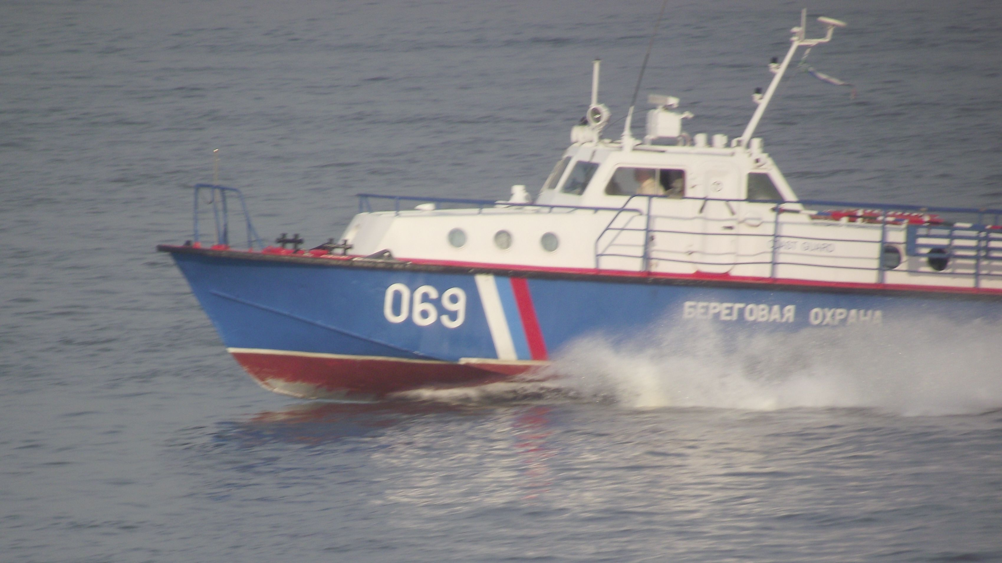 Катер Амурской флотилии